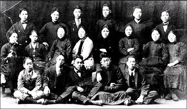 1929년 모스크바 국제 레닌학교 학생들. 앞줄 왼쪽에서 세번째가 박헌영이다.